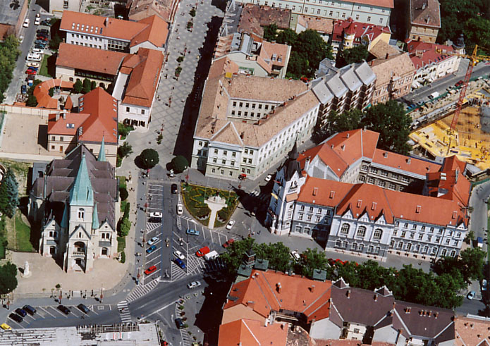 Kaposvár - Hungary - Europe